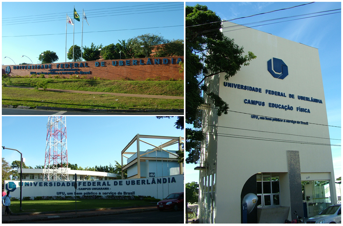 Campi Uberlândia da UFU